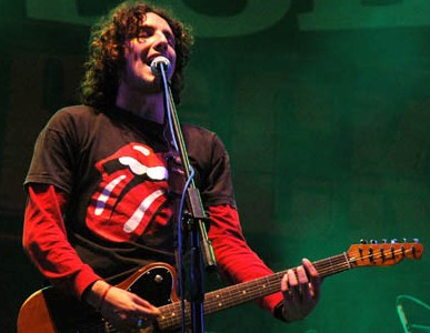 Emiliano Brancciari, vocalista de No Te Va Gustar, dando un concierto junto a su banda en el estadio Charrua de Montevideo.